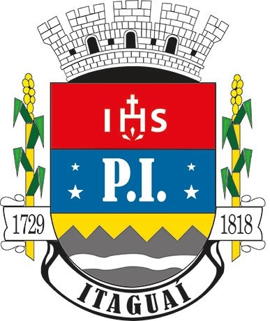 Brasão de armas do município de Itaguaí, no estado do Rio de Janeiro, em alta resolução.